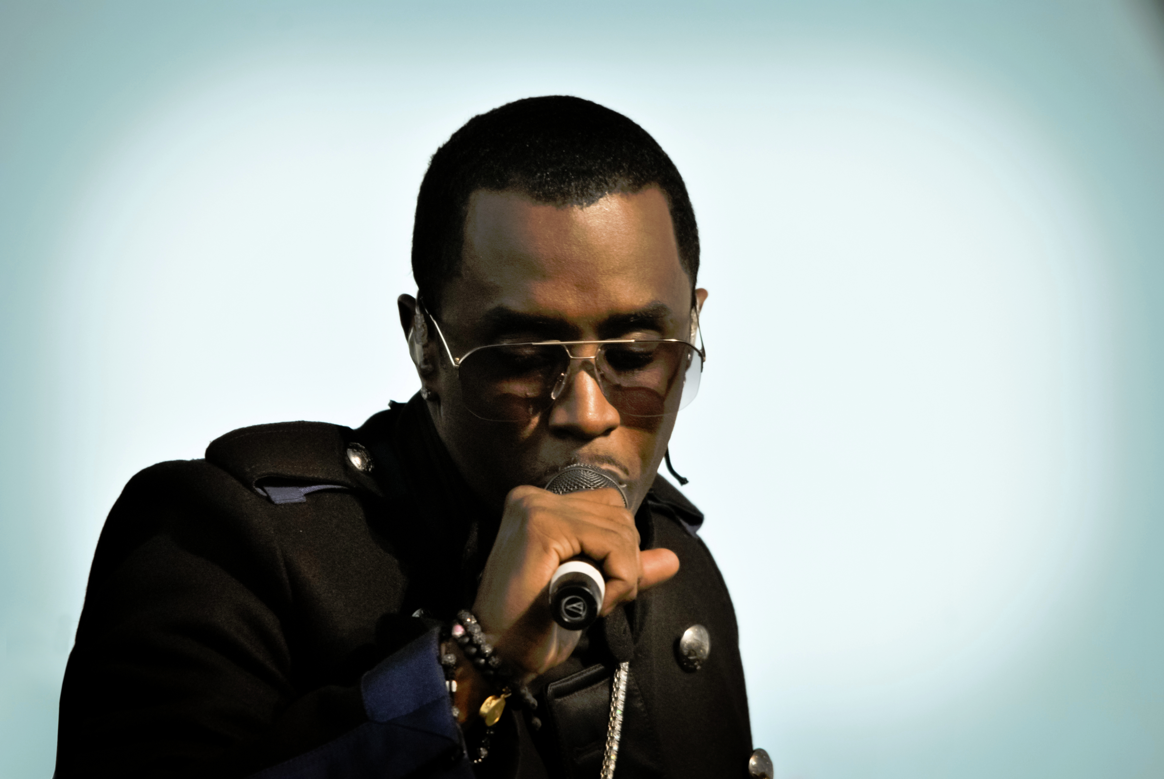 Diddy 13